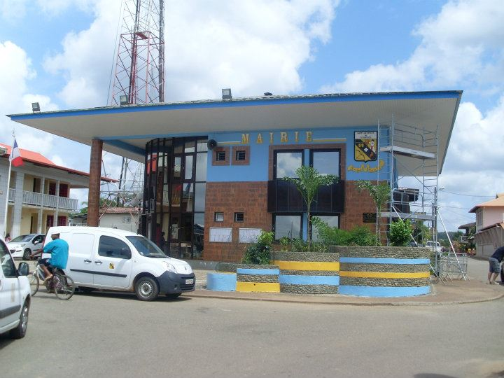 Marie typique